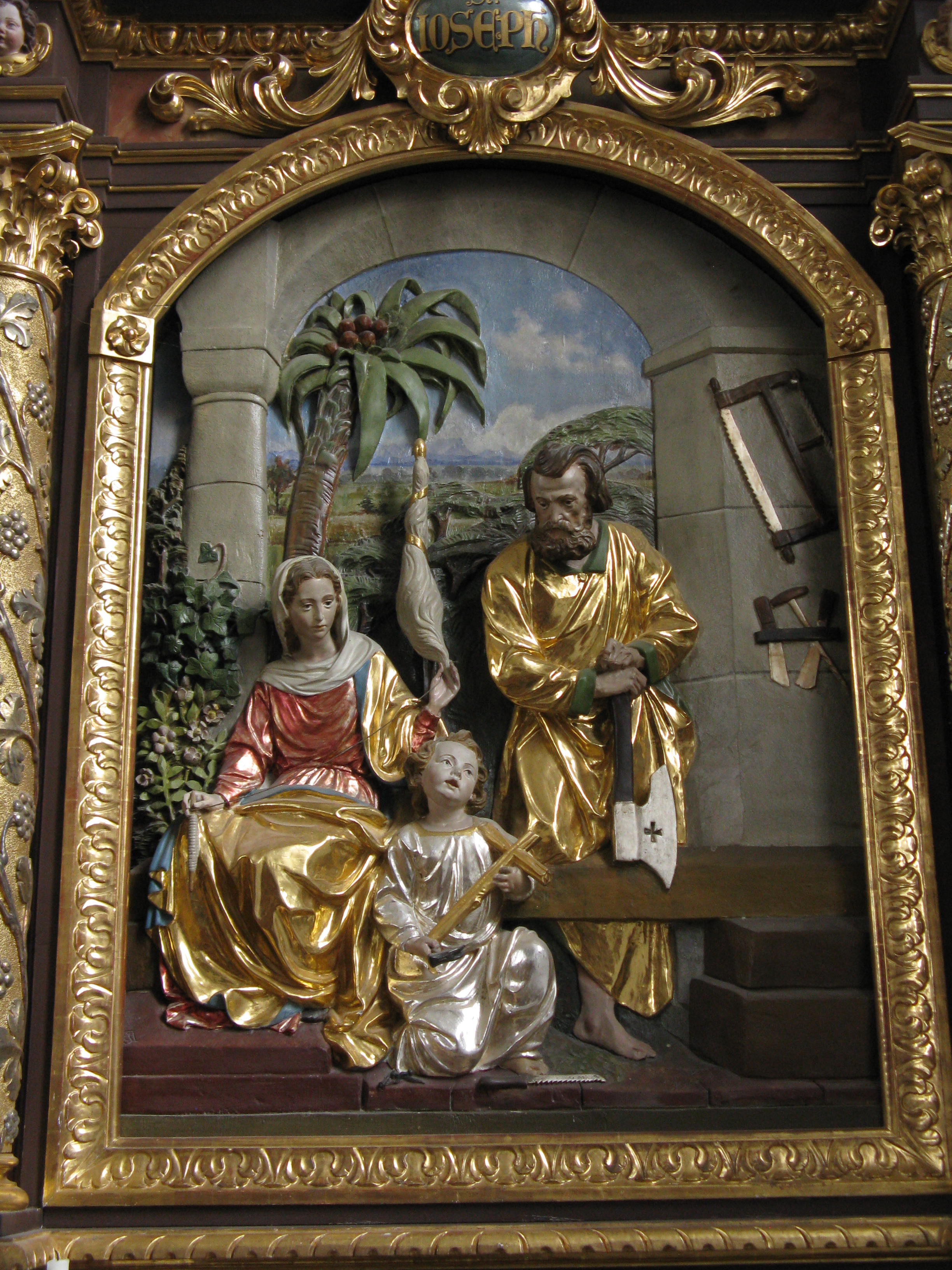 rechter Seitenaltar in der Kirche St. Michael, Seeshaupt, Altarbild, Heilige Familie